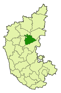 Koppal dist